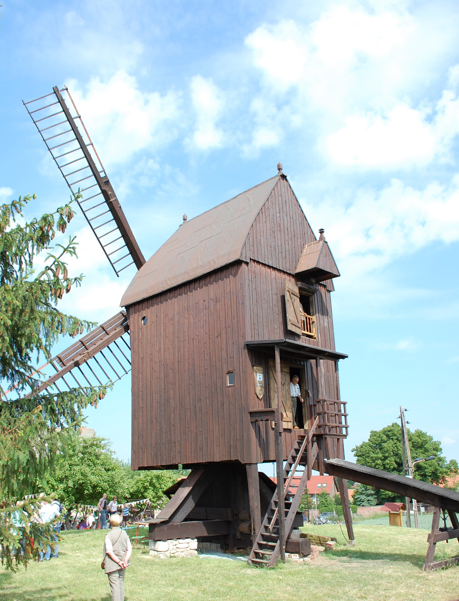 Windmühle Anderbeck